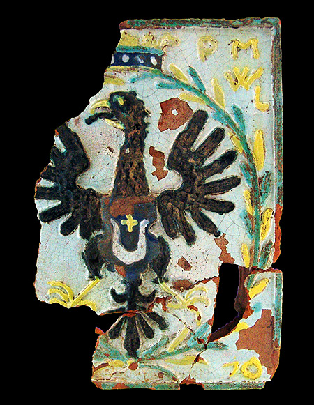 Фрагмент паліхромнай кафлі з выявай герба князёў Палубінскіх з Глускага замка. Гліна, паліва. Раскопкі Ірыны Ганецкай History Museum at the National Academy of Sciences of Belarus Native nameМузей гісторыі НАН БеларусіParent institutionNational Academy of Sciences of BelarusLocationMinsk, BelarusCoordinates53° 55′ 14.12″ N, 27° 35′ 54.4″ E Web page control : Q18691624 institution QS:P195,Q18691624